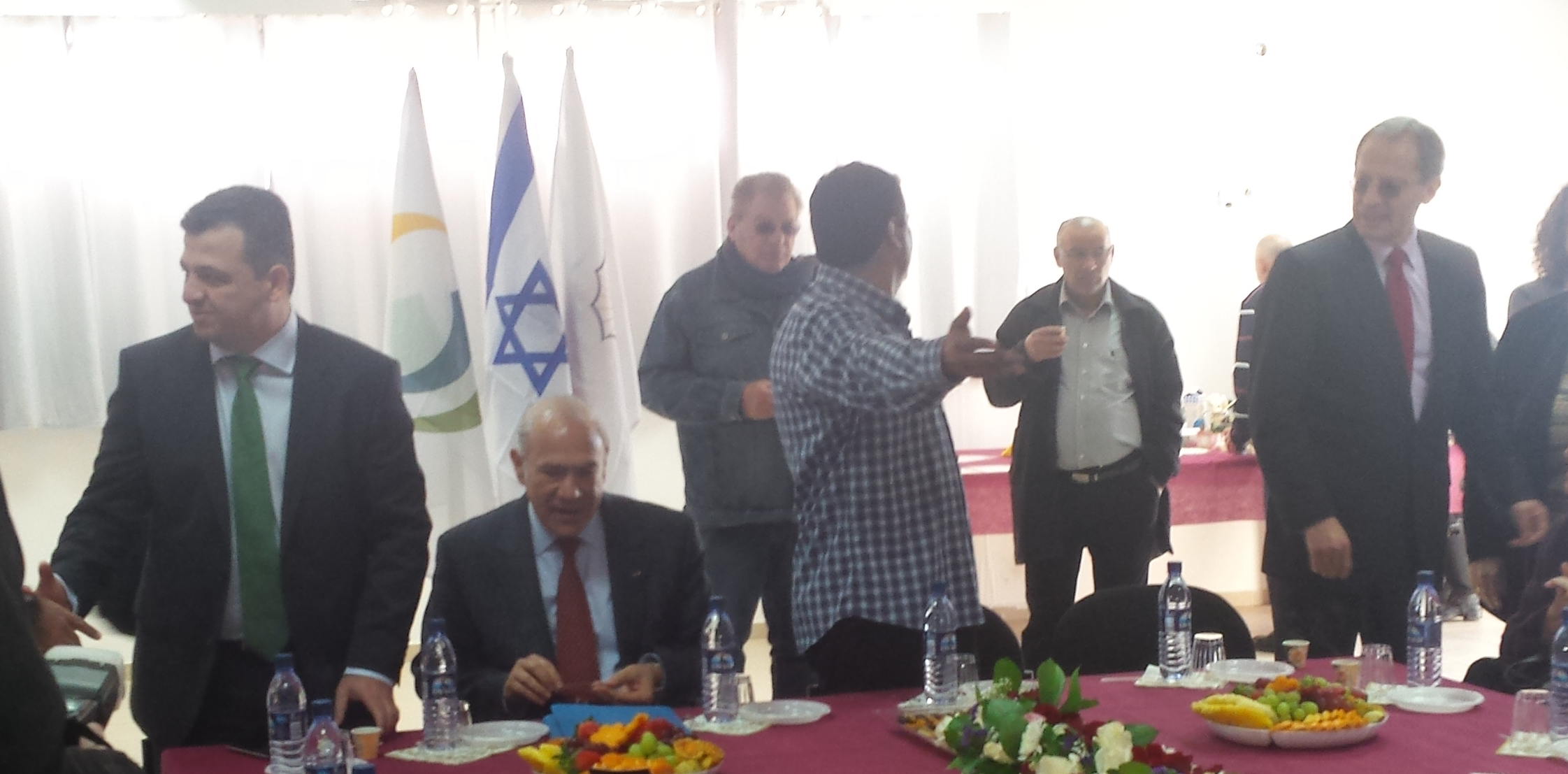 מזכ"ל ה-OECD בביקור בפרויקט ואדי עתיר בחורה, בליווי מוחמד אלנבארי נציגי משרדי האוצר וכרמל שאמה הכהן